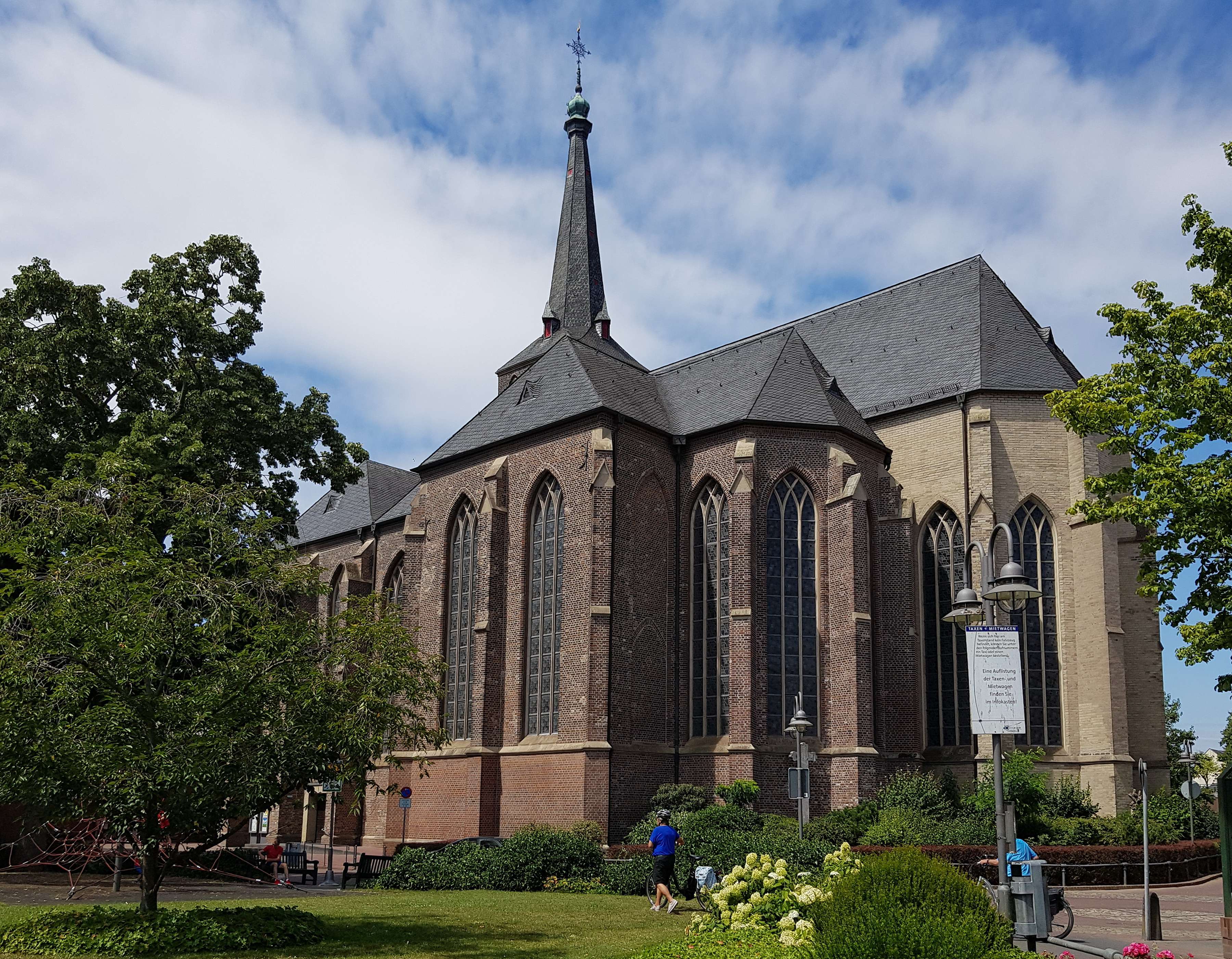 Pfarrkirche St. Maria Magdalena in Geldern, Kirchplatz 11. This image shows a heritage building in Germany, located in the North Rhine-Westphalian city Geldern (no. GE10012).